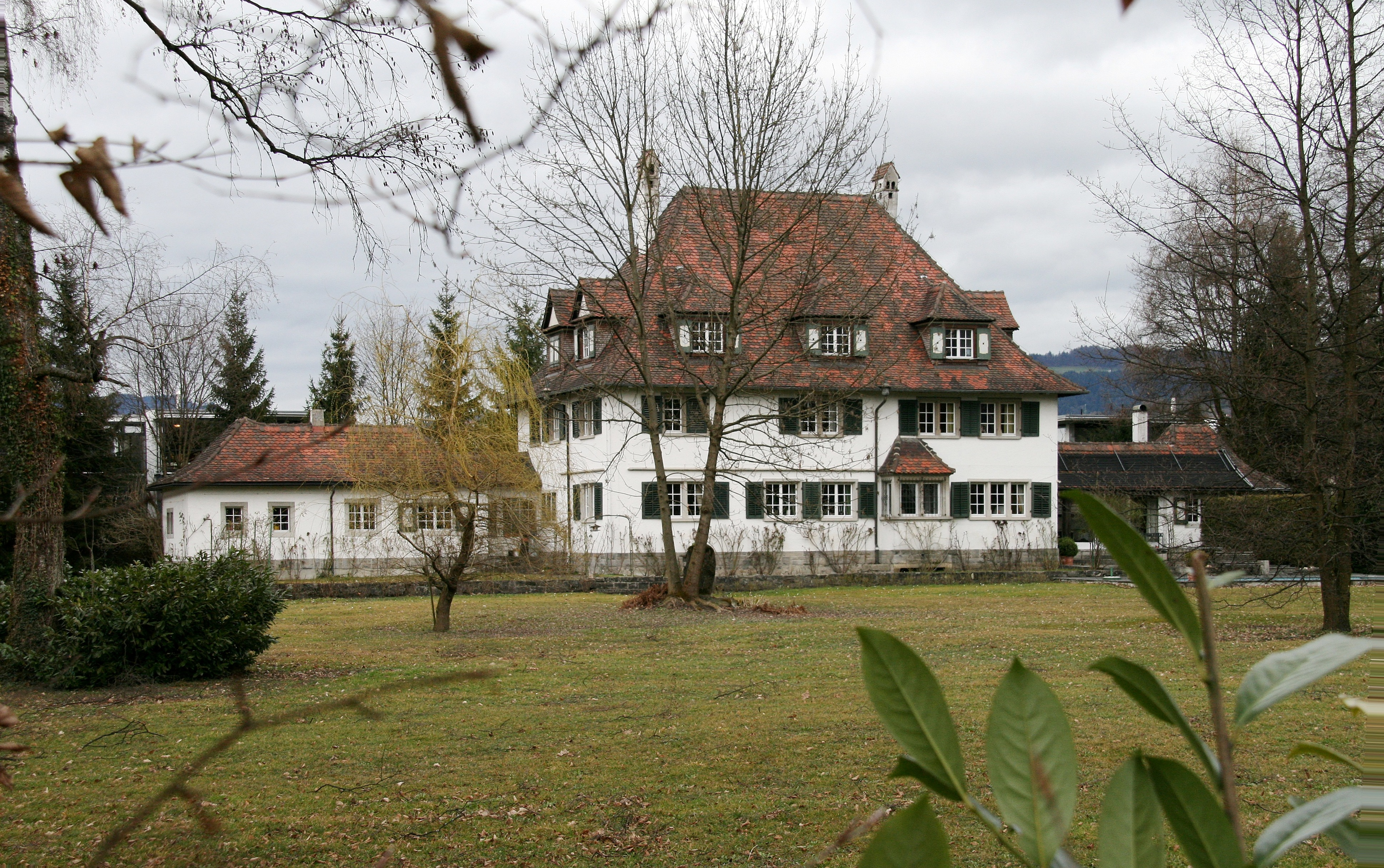 aus dem DEHIO Vorarlberg 1983: Färbergasse Nr. 16: Fabrikantenvilla in unmittelbarer Nähe des Werkes Rohrbach, erbaut 1939 - 1941 von Johann Anton Tscharner, nationalromantischer Stil. *** in Dornbirn, Vorarlberg. Wahrscheinlich Ulmer- oder Rhomberg-Villa.